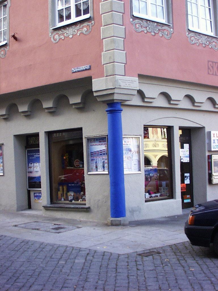 Die Blaue Saul, eines der 7 Memminger Wahrzeichen